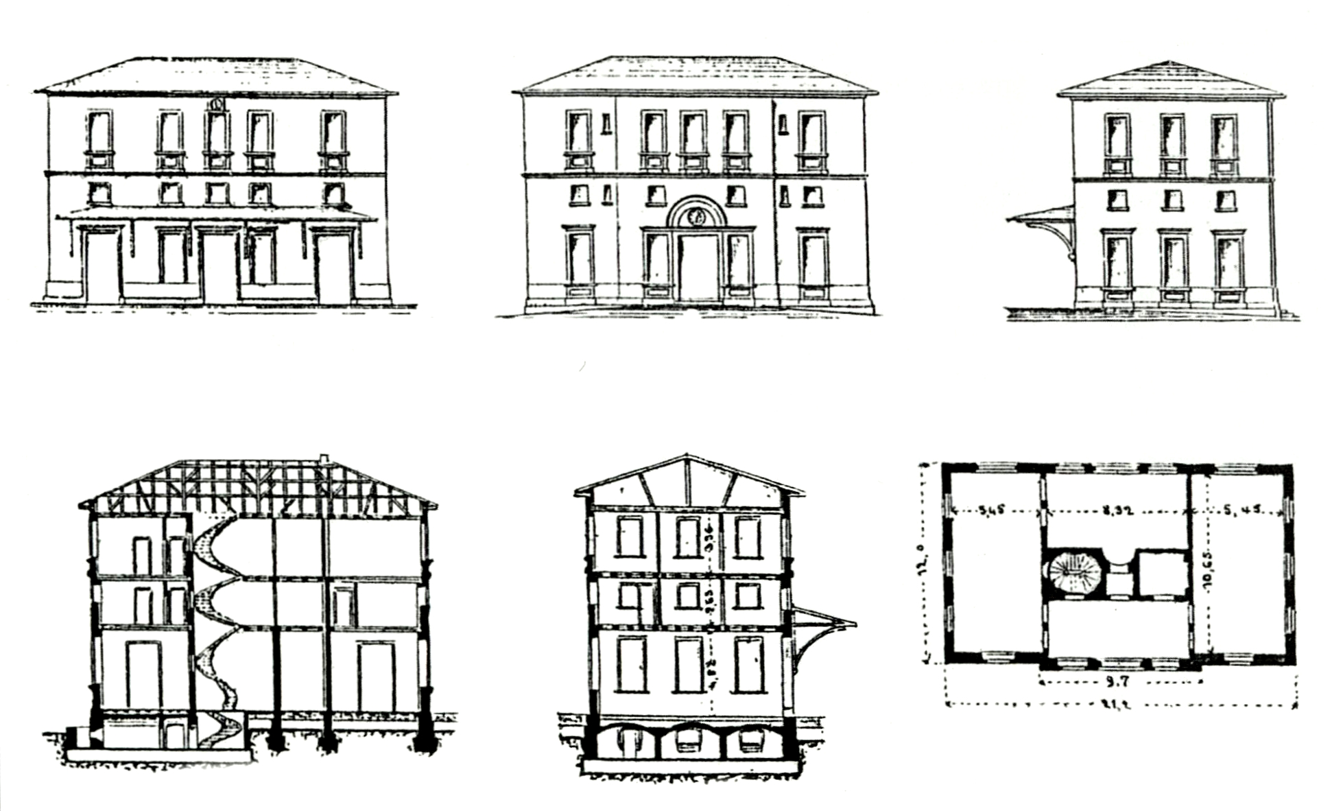 Bauplan des Empfangsgebäudes des Bahnhofs Dorfen. Obere Reihe: Aufriss der Gleisansicht (links), der Straßenansicht (Mitte) und der Ostansicht (rechts). Untere Reihe: Aufriss im Längsschnitt (links) und im Querschnitt (Mitte), Grundriss des Erdgeschosses. (rechts)